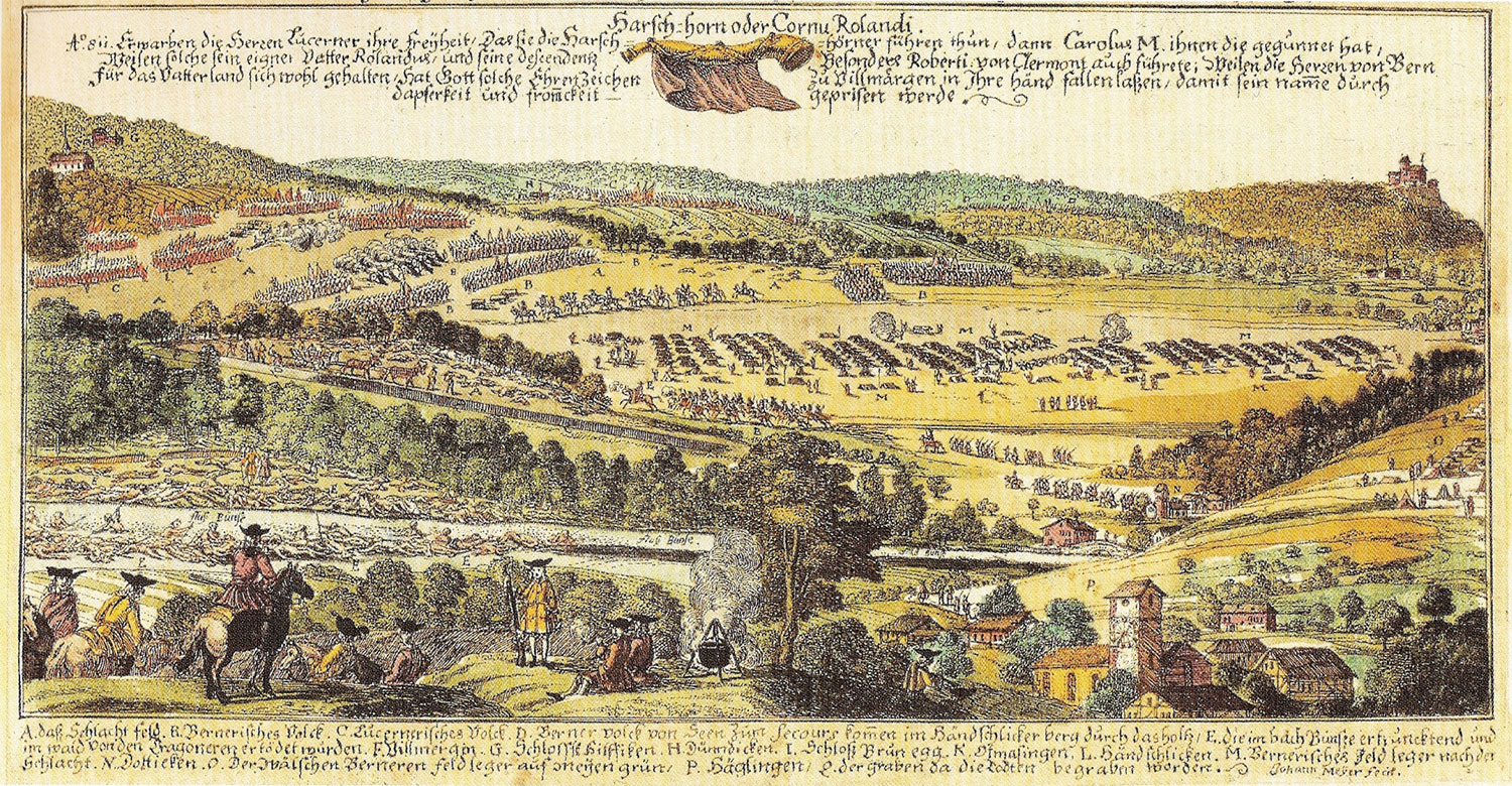 Darstellung der Zweiten Schlacht von Villmergen am 25. Juli 1712